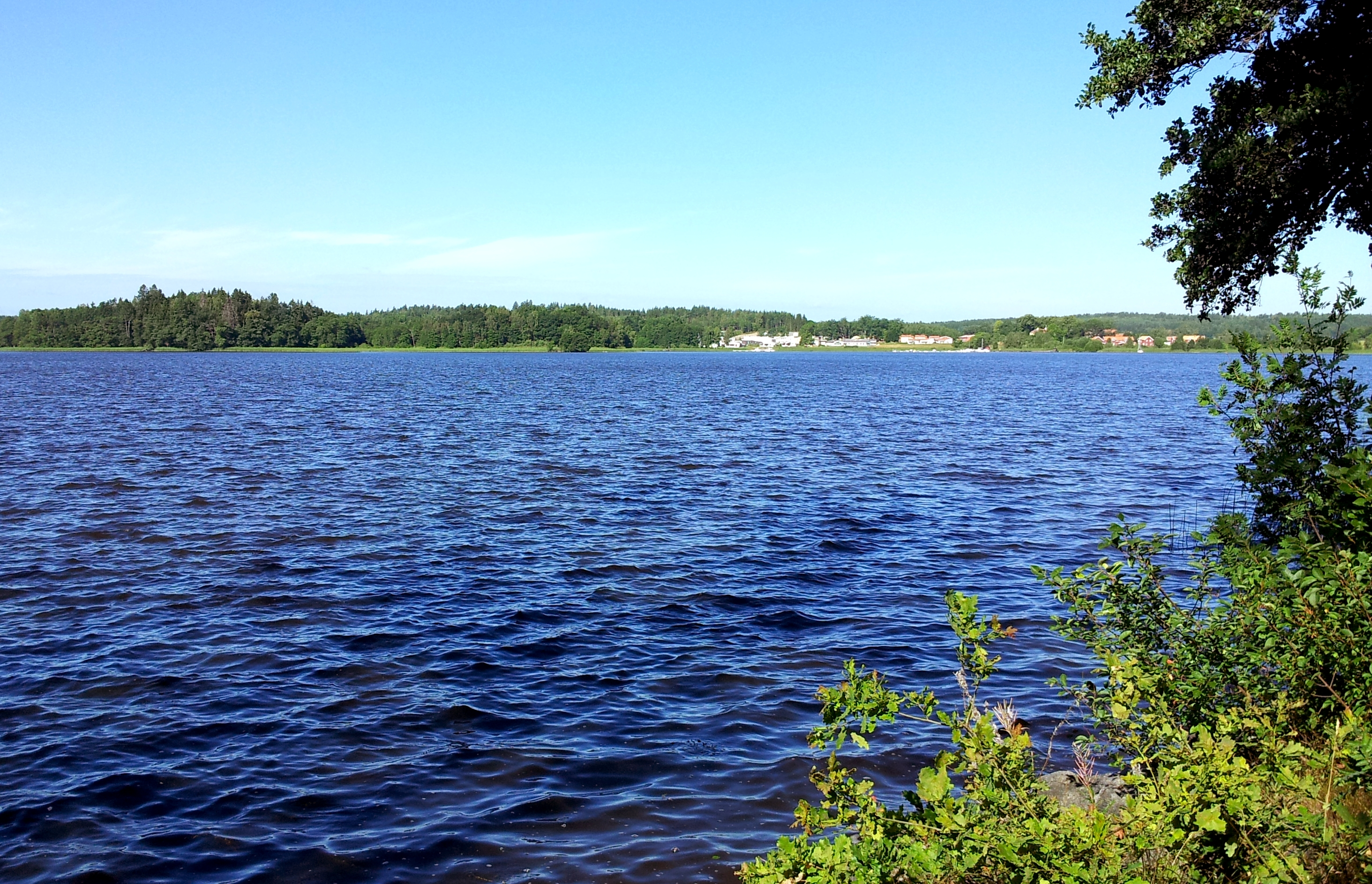 Marielundsviken, den inre delen av Gripsholmsviken, Mariefred, juli 2012